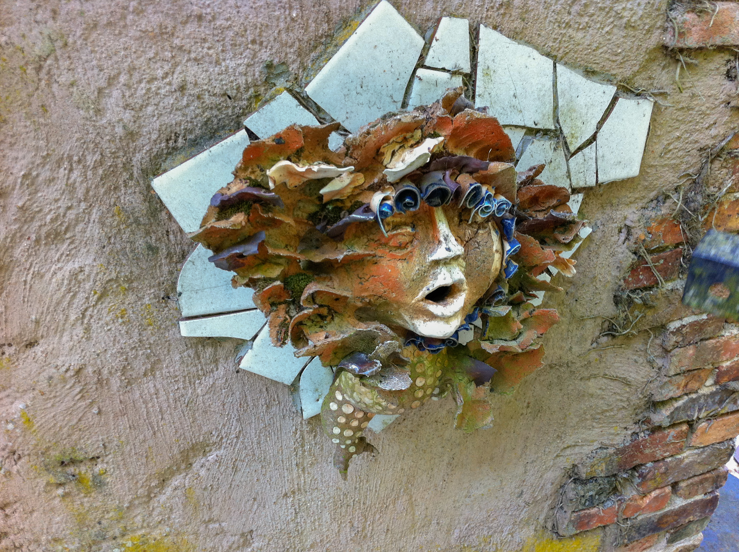 Grotesque.